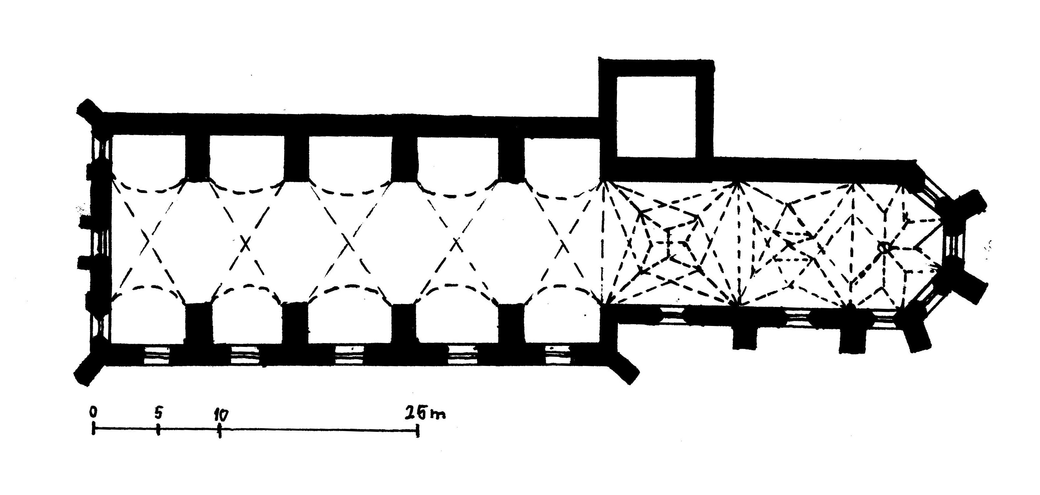 Pôdorys kostola